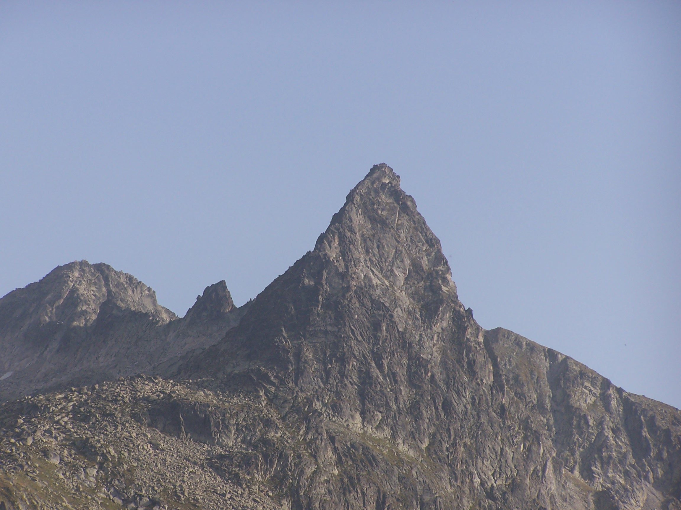 Photo du Campanal de Larrens lors de l'ascension du pic